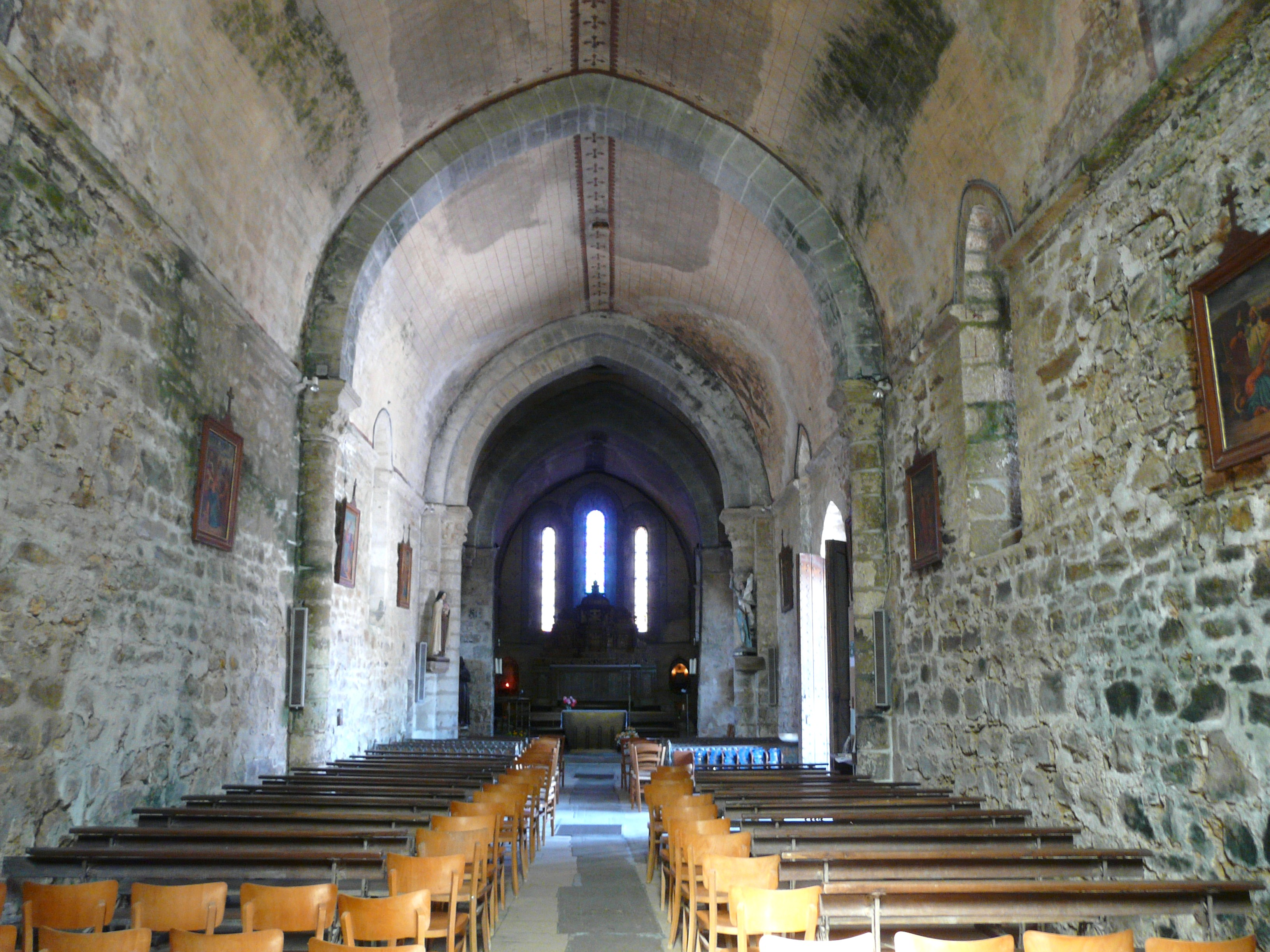 La nef et le chœur de l'église Notre-Dame, La Peyratte, Deux-Sèvres, France